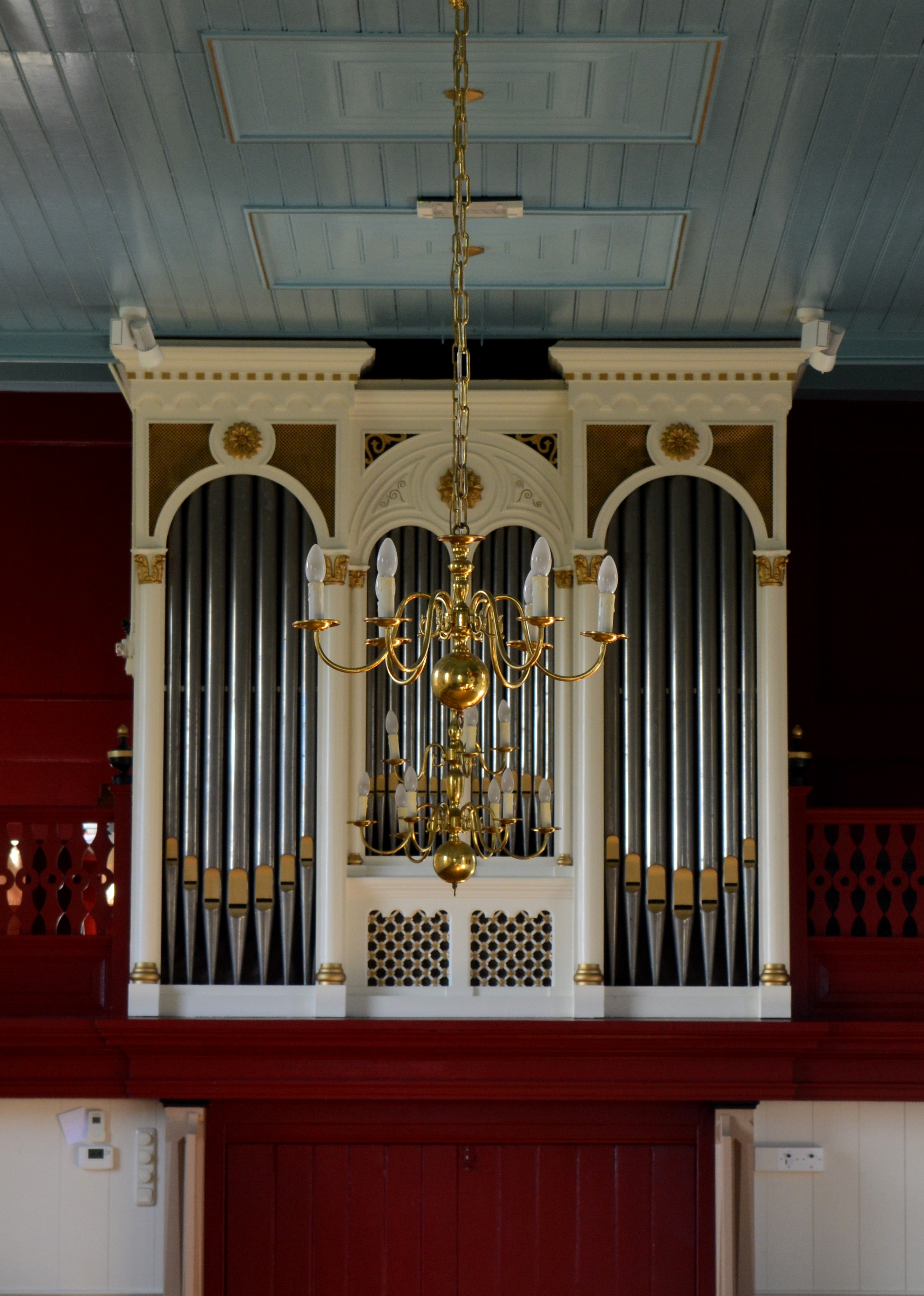 Ureterp, Petruskerk, kerkorgel